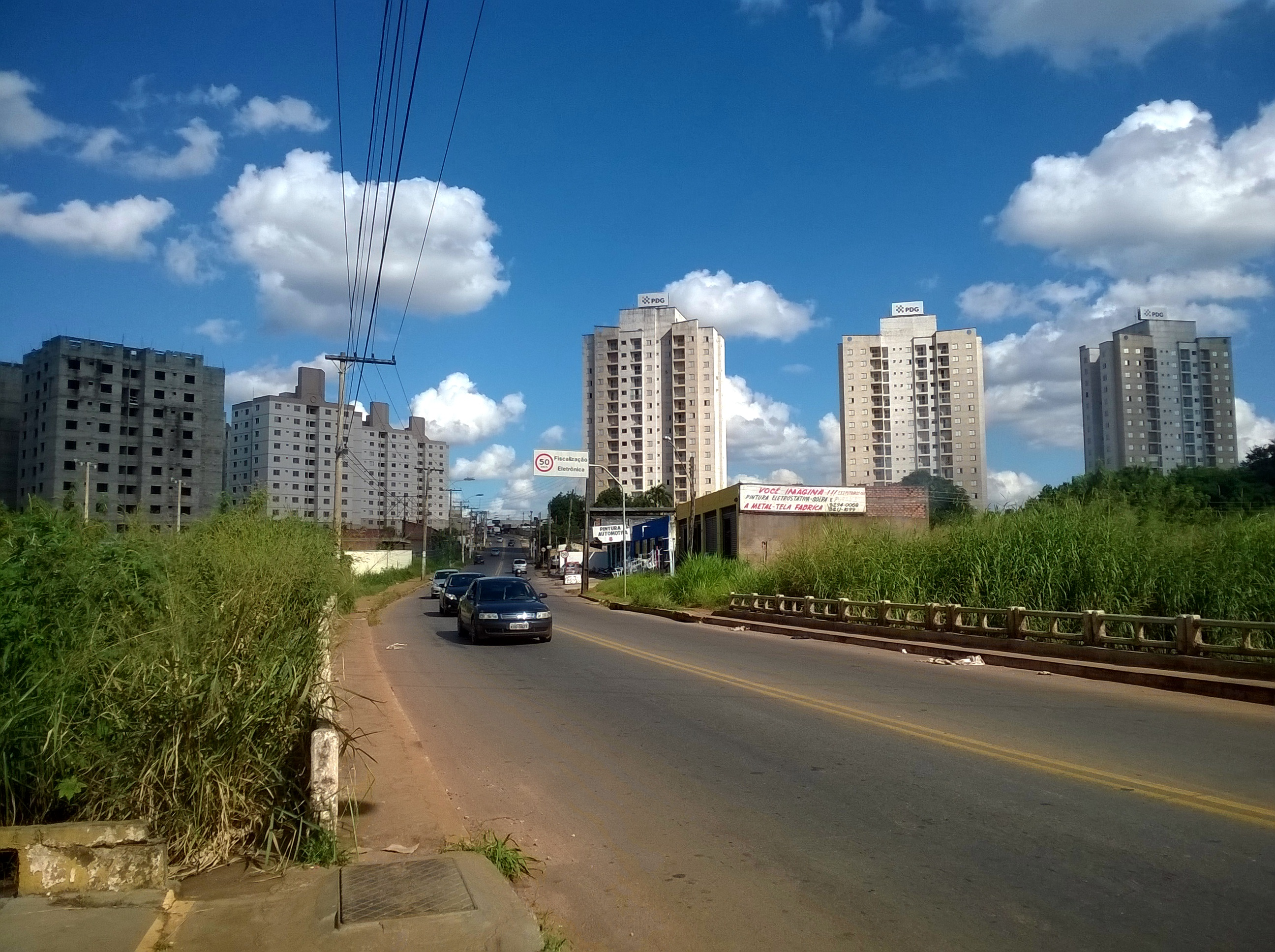 Avenida Marechal Rondon, na região da Vila Nossa Senhora Aparecida/Urias Magalhães/Centro-Oeste. A imagem foi fotografada em 7 de maio de 2015.